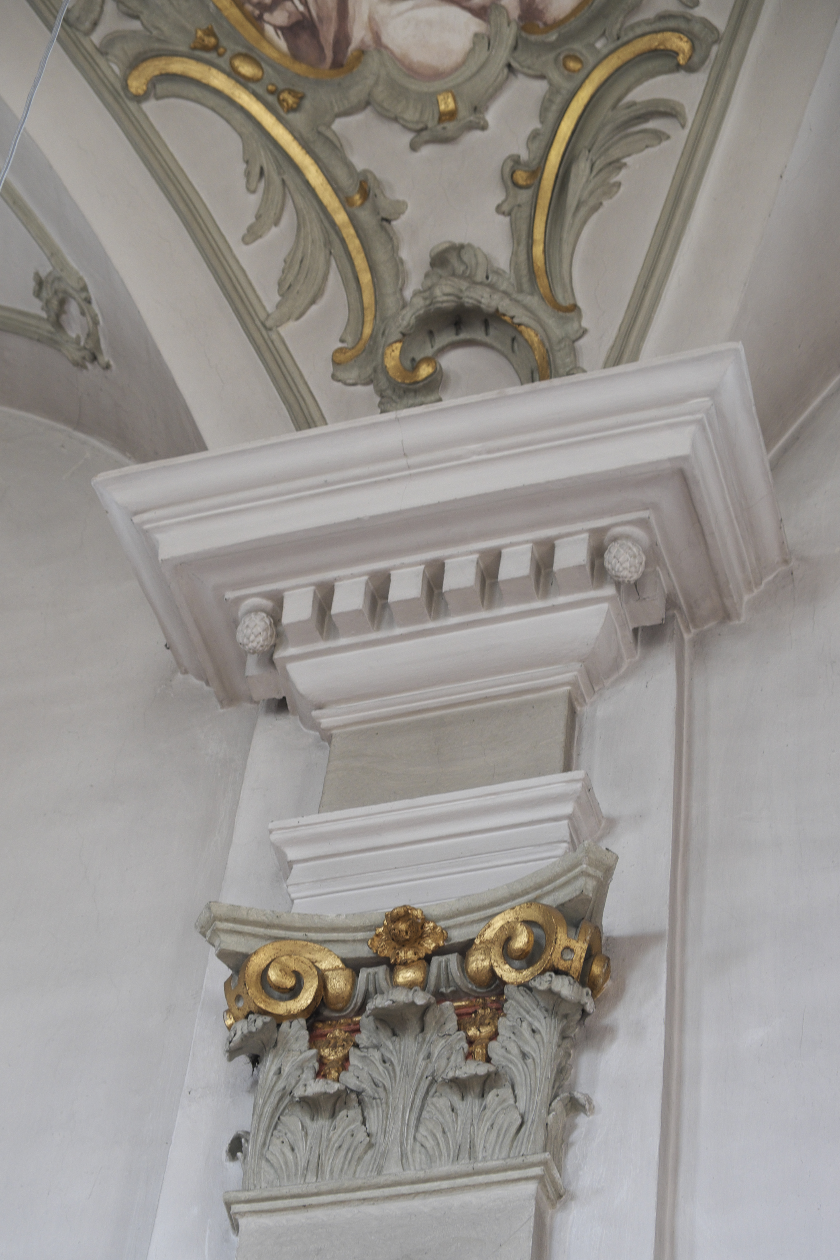 Katholische Pfarrkirche Zur Schmerzhaften Muttergottes in Waalhaupten (Waal) im Landkreis Ostallgäu (Bayern/Deutschland), Stuck von Johann Michael Gigl, von 1787, Pilaster mit Kapitell und Gebälk